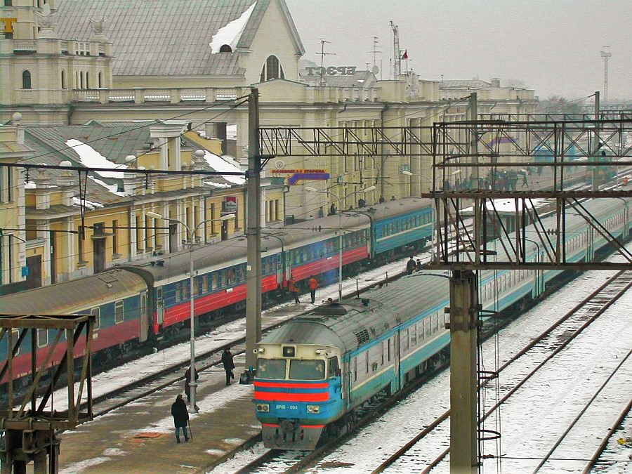 Dworzec kolejnowy w Brześciu nad Bugiem (strona moskiewska), 2 marca 2003 r.